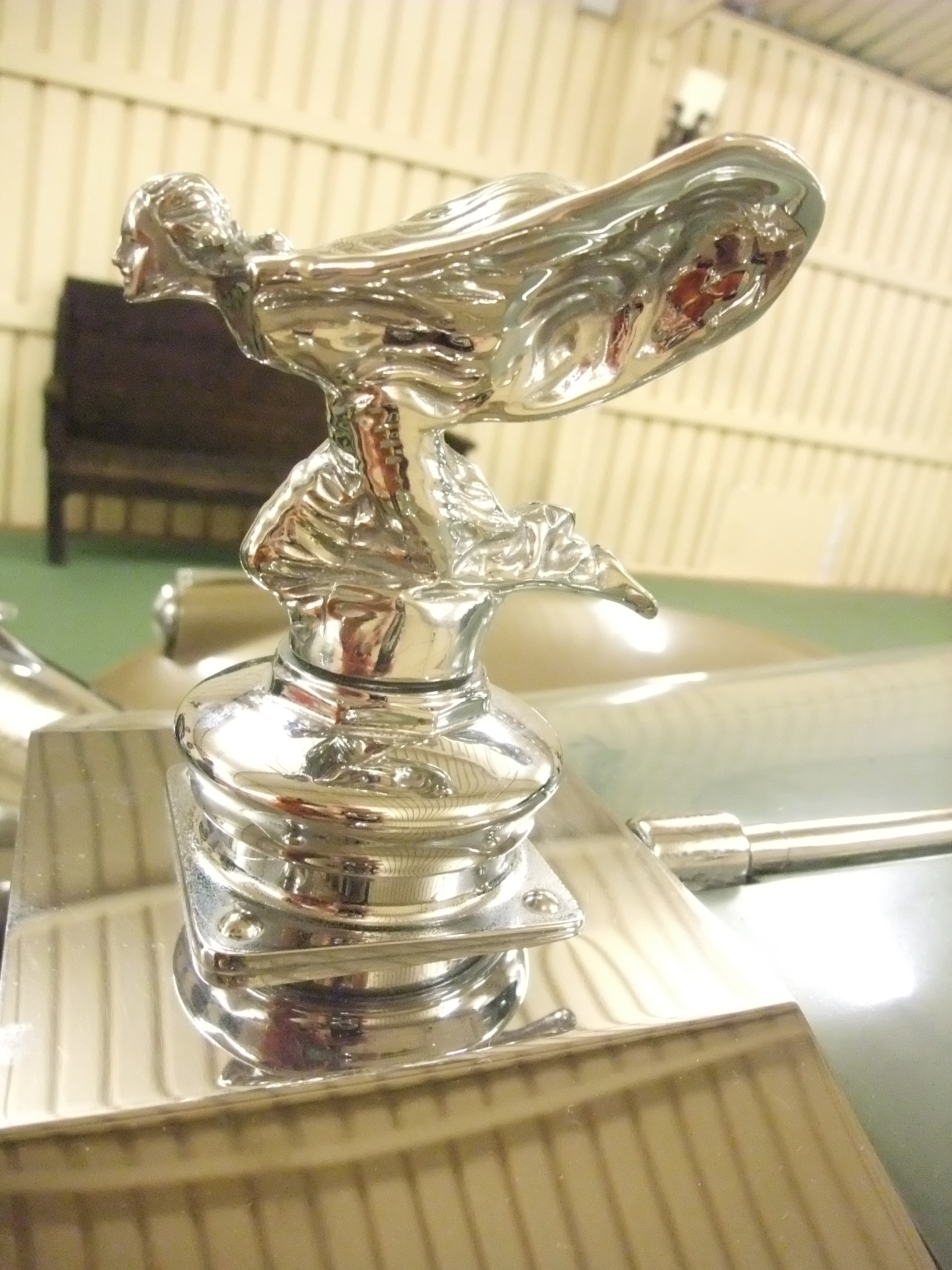 Galdames (Vizcaya)-Museo de coches antiguos-26-Emblema de Rolls Royce 'El espíritu del éxtasis'